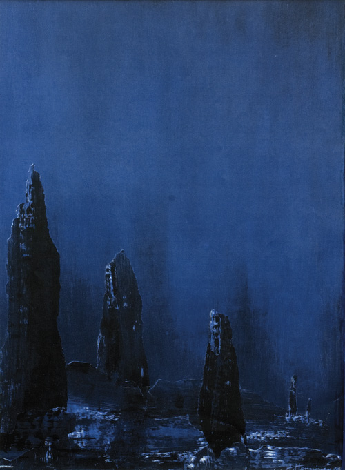 Titel Blaue Landschaft